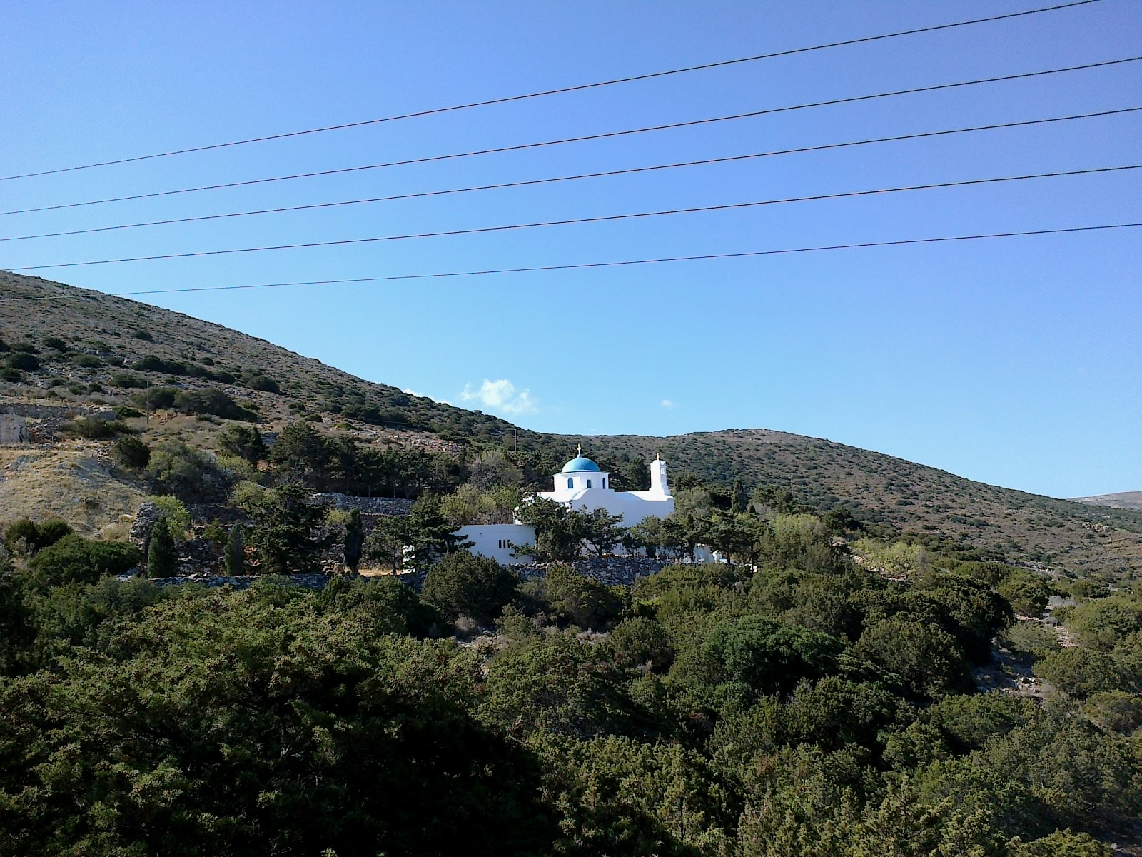 Cyclades Paros Langovardas Monastere